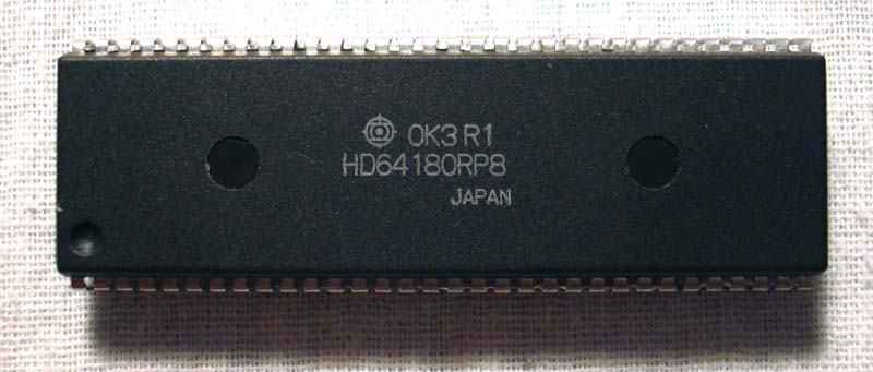 HD64180